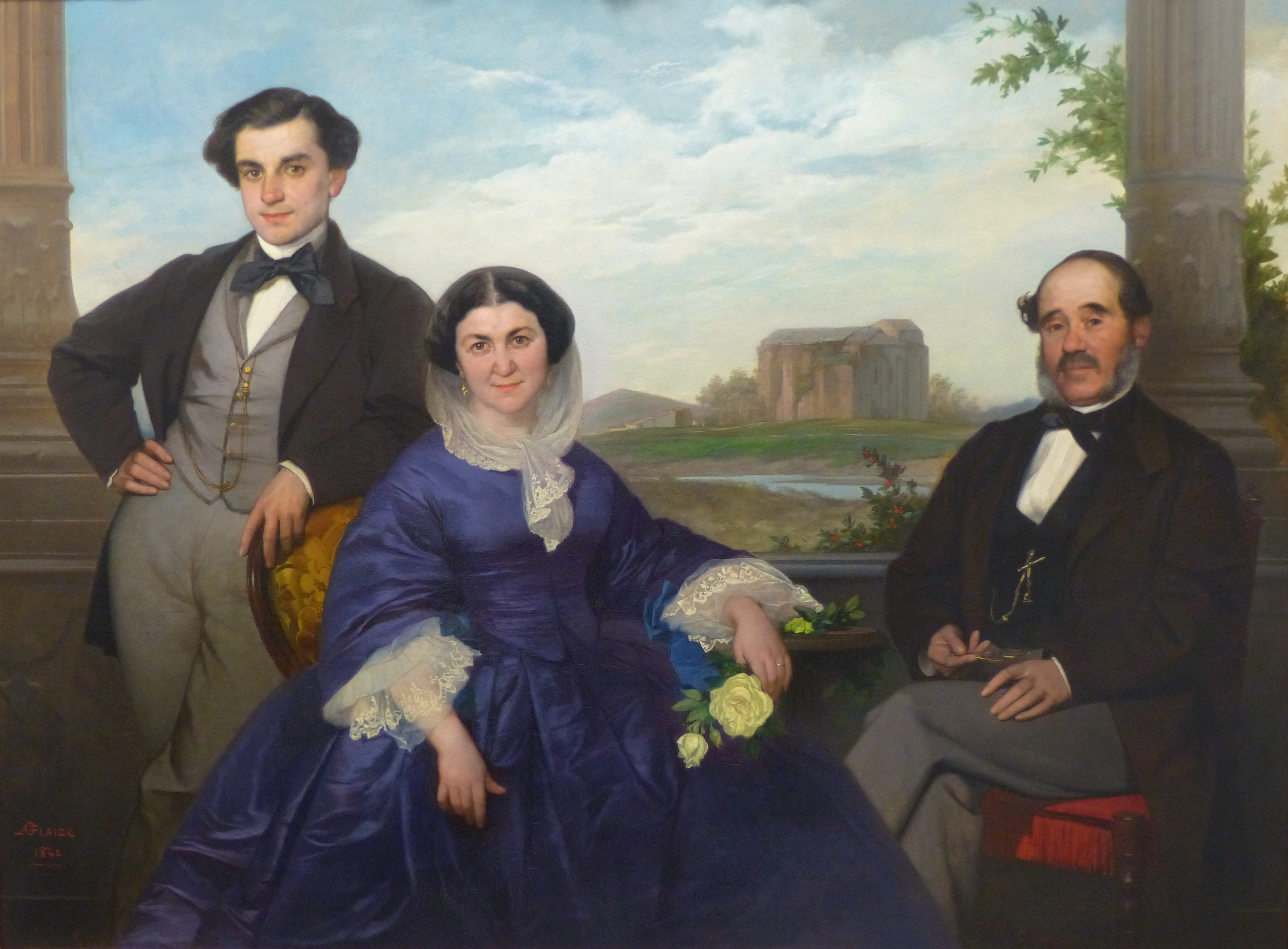 Frédéric Fabrège et ses parents devant la cathédrale de Maguelone qu'il fit restaurer à ses frais; les Fabrège habitaient 33, Grand Rue à Montpellier et étaient négociants en meubles.